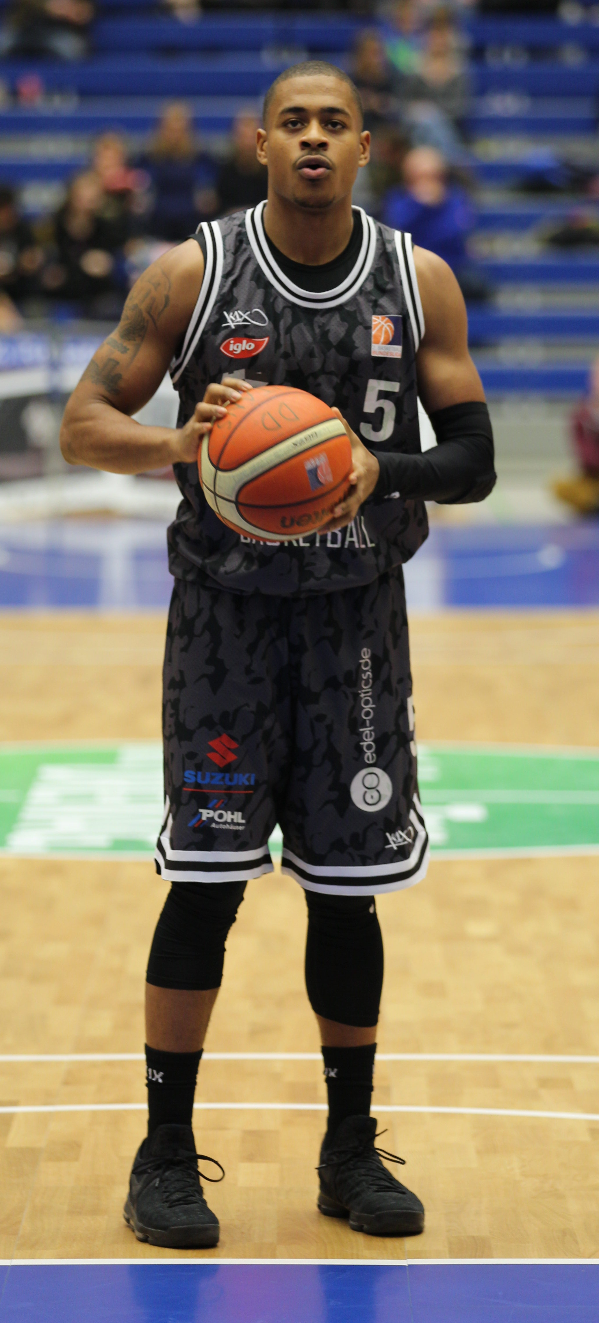 Roderick R. Camphor, Hamburg Towers, Nr. 5